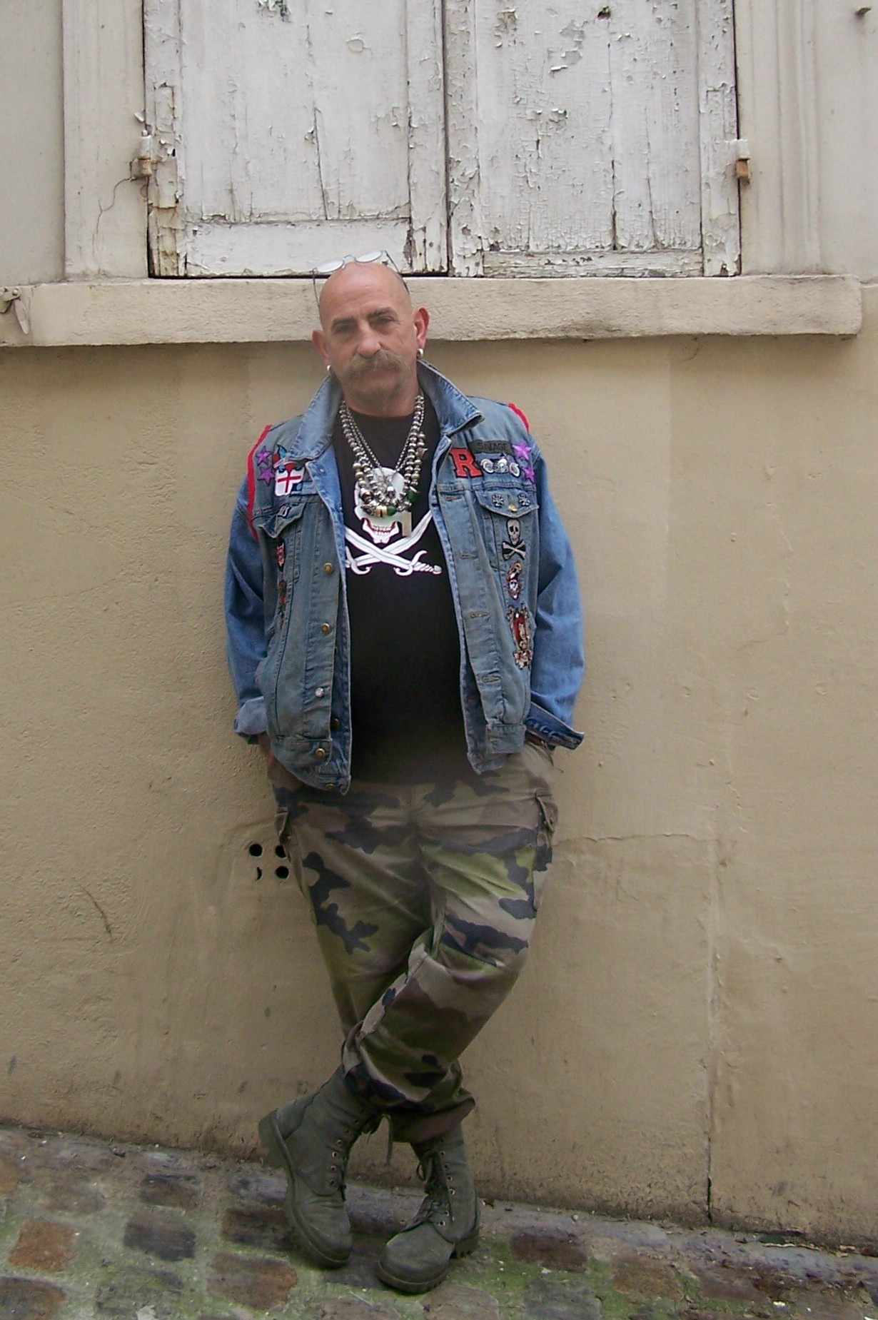 Rico Daniels